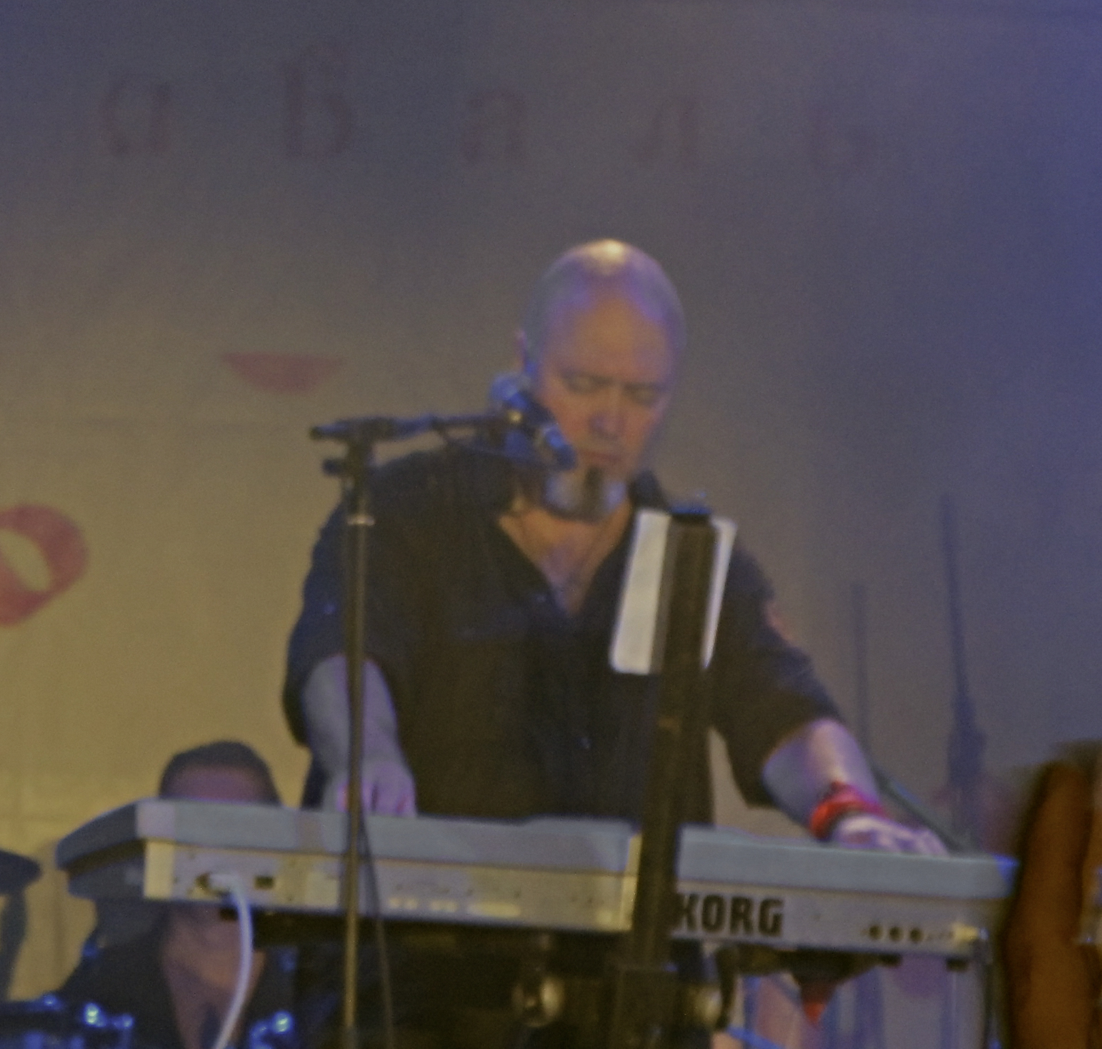 Андрій Середа і гурт Кому Вниз на фестивалі Підкамінь, 2013